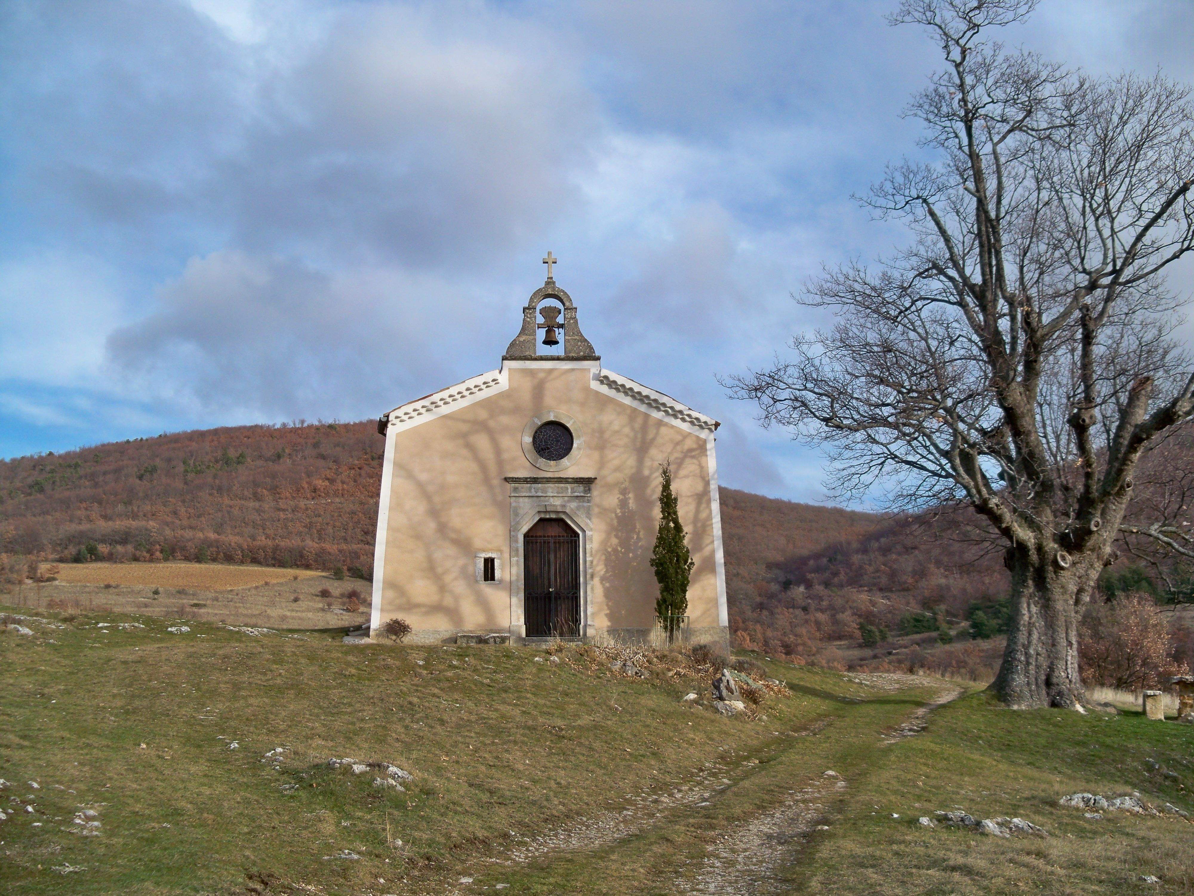 Chapelle Saint Michel, près du hameau de Bertranet, comune de Saumane (04) France